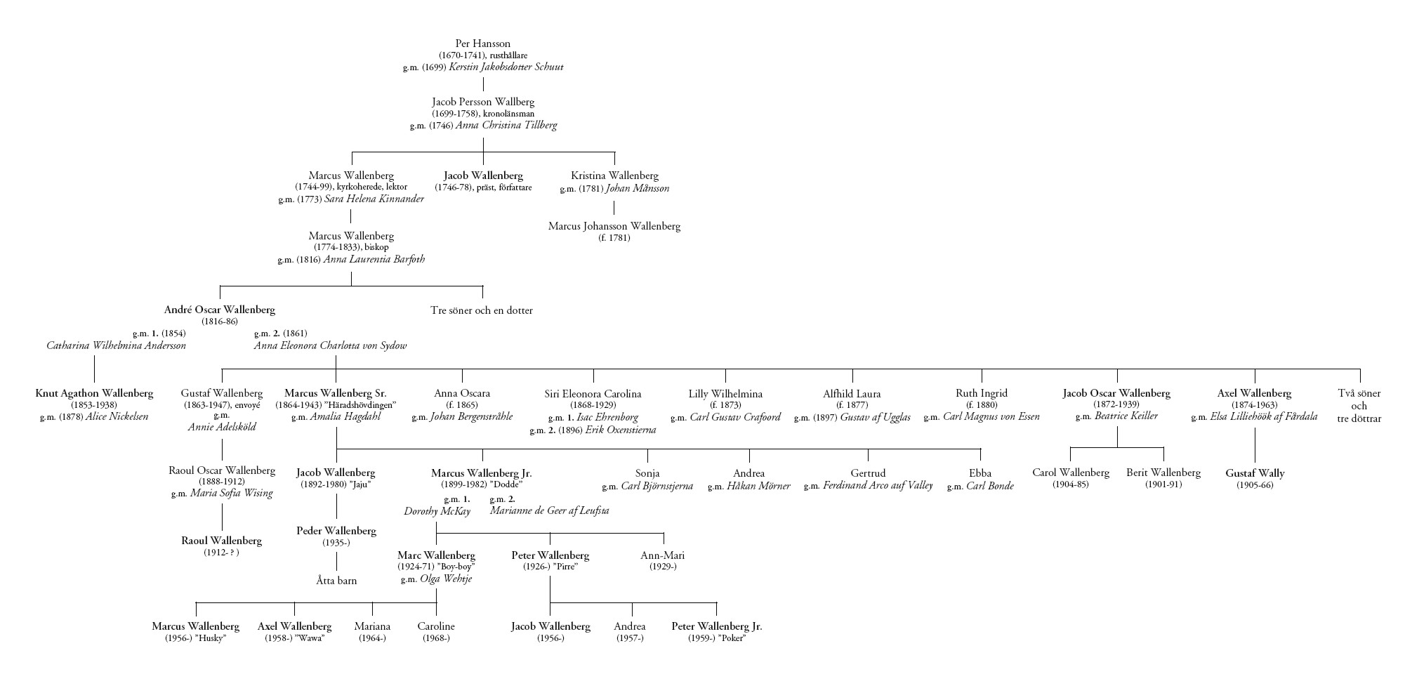 Släktträd över släkten Wallenberg baserad på information i Wikipedia samt på allmänna uppgifter publicerade i media eller på Internet i övrigt.